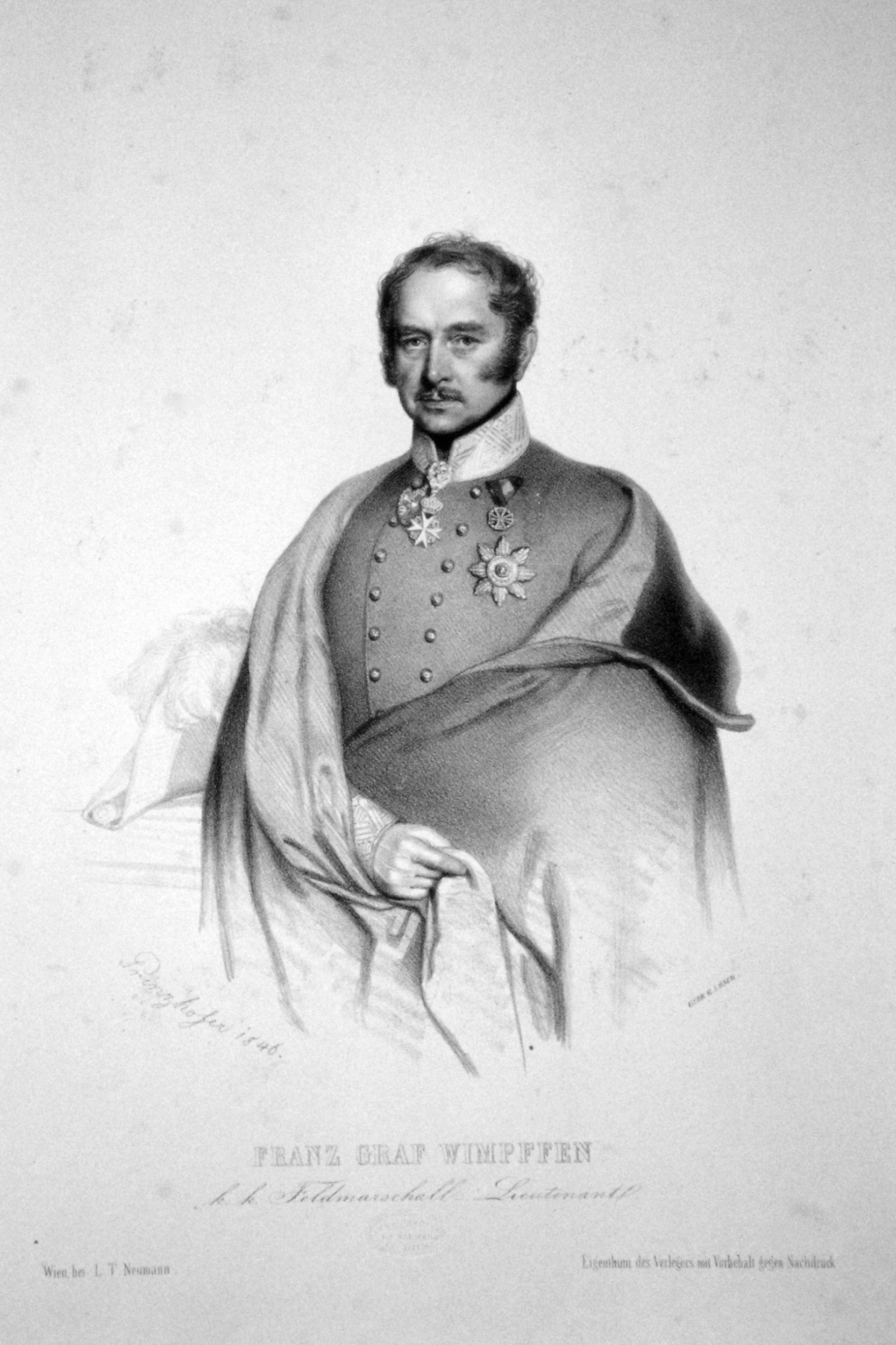 Franz Graf Wimpffen (1797-1870) k. k. Feldzeugmeister, Admiral, Oberkommandierender der österreicischen Flotte. Lithographie von August Prinzhofer, 1846